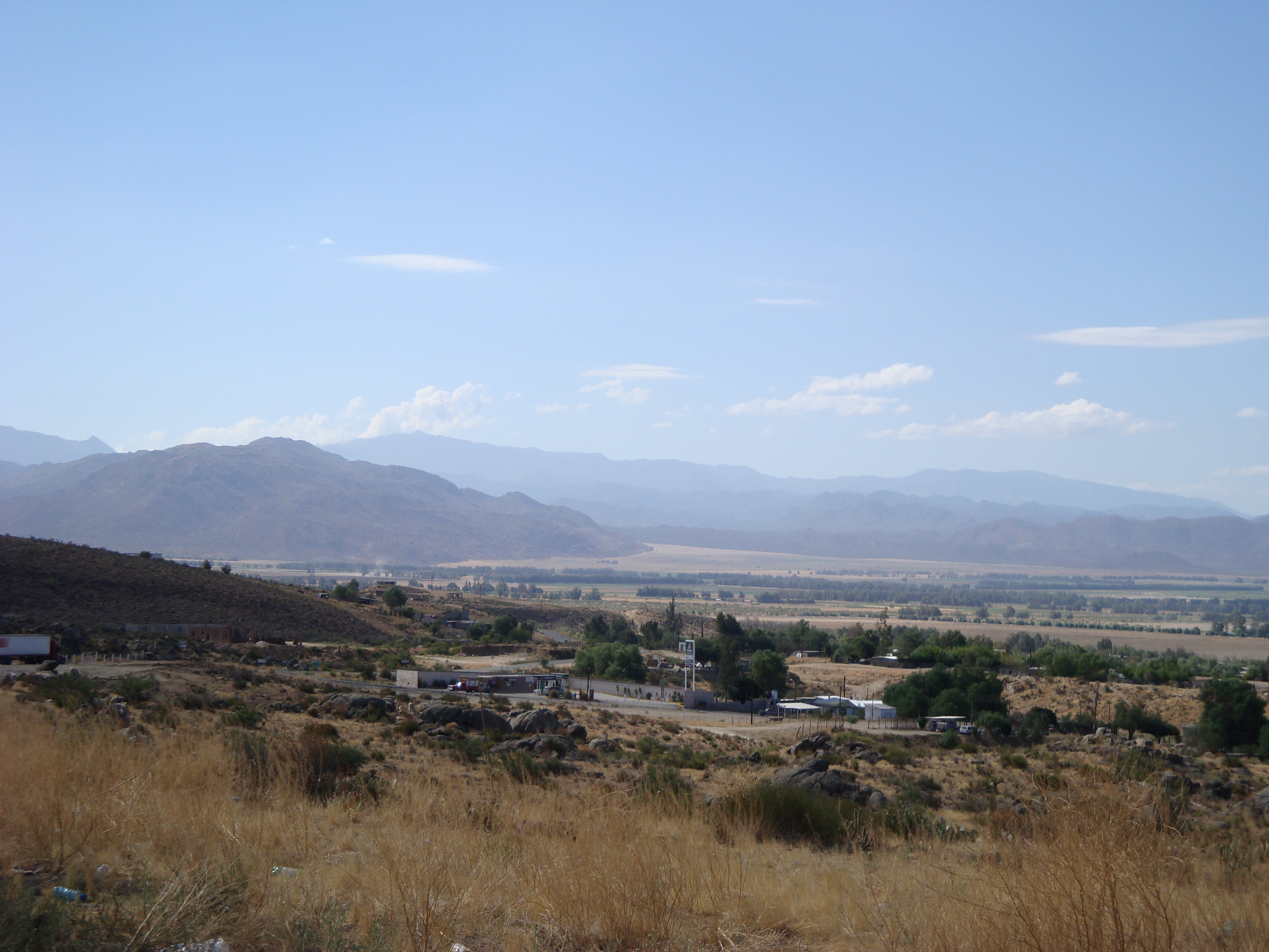 Vista panoramica del Valle de la Trinidad, desde la carretera Ensenada-San Felipe. Municipio de Ensenada — Baja California.